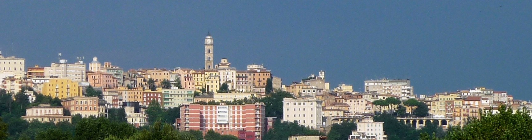 scorcio frosinone